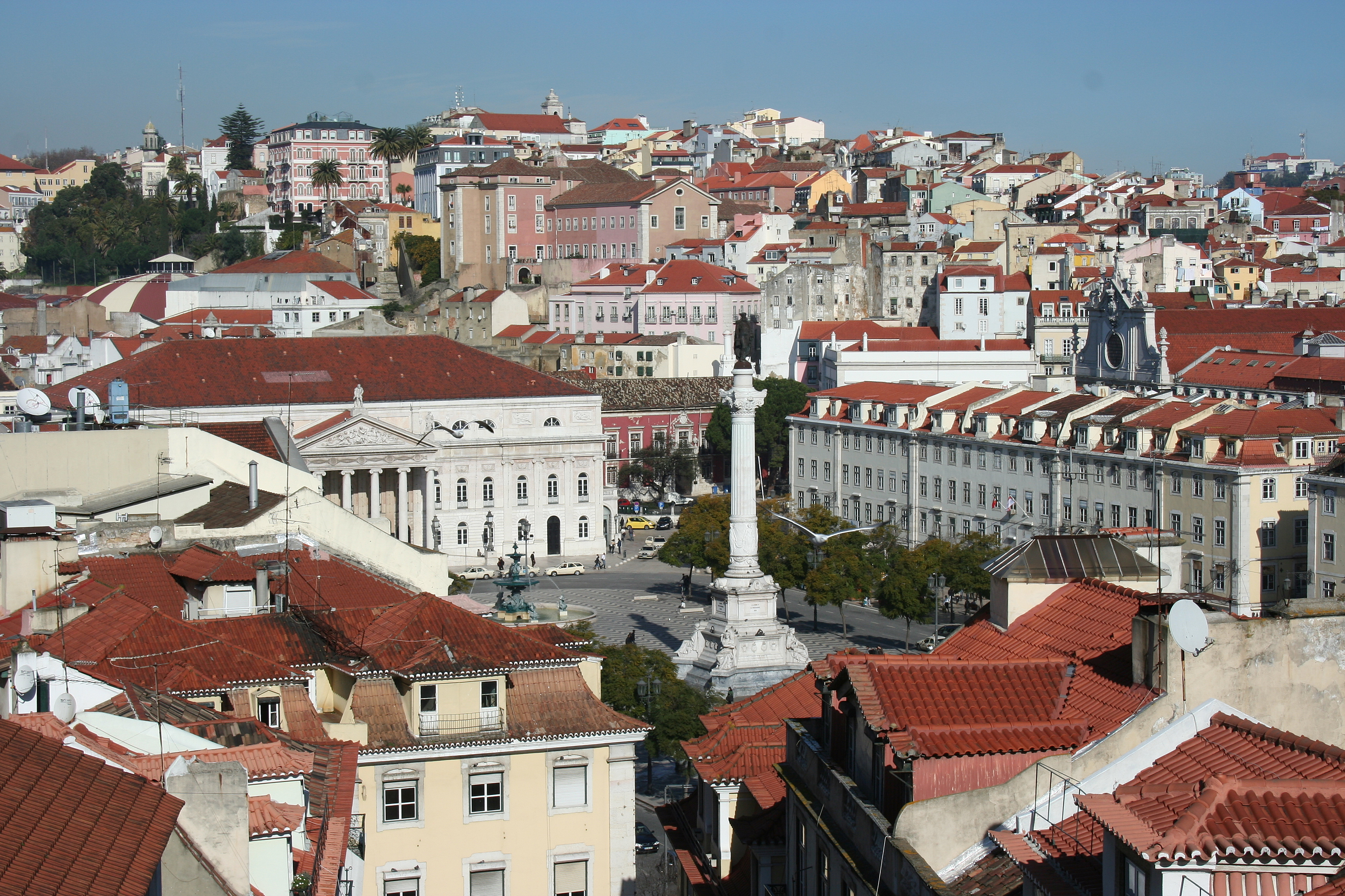 Vista de la Praça Dom Pedro IV desde el elevador de Santa Justa.